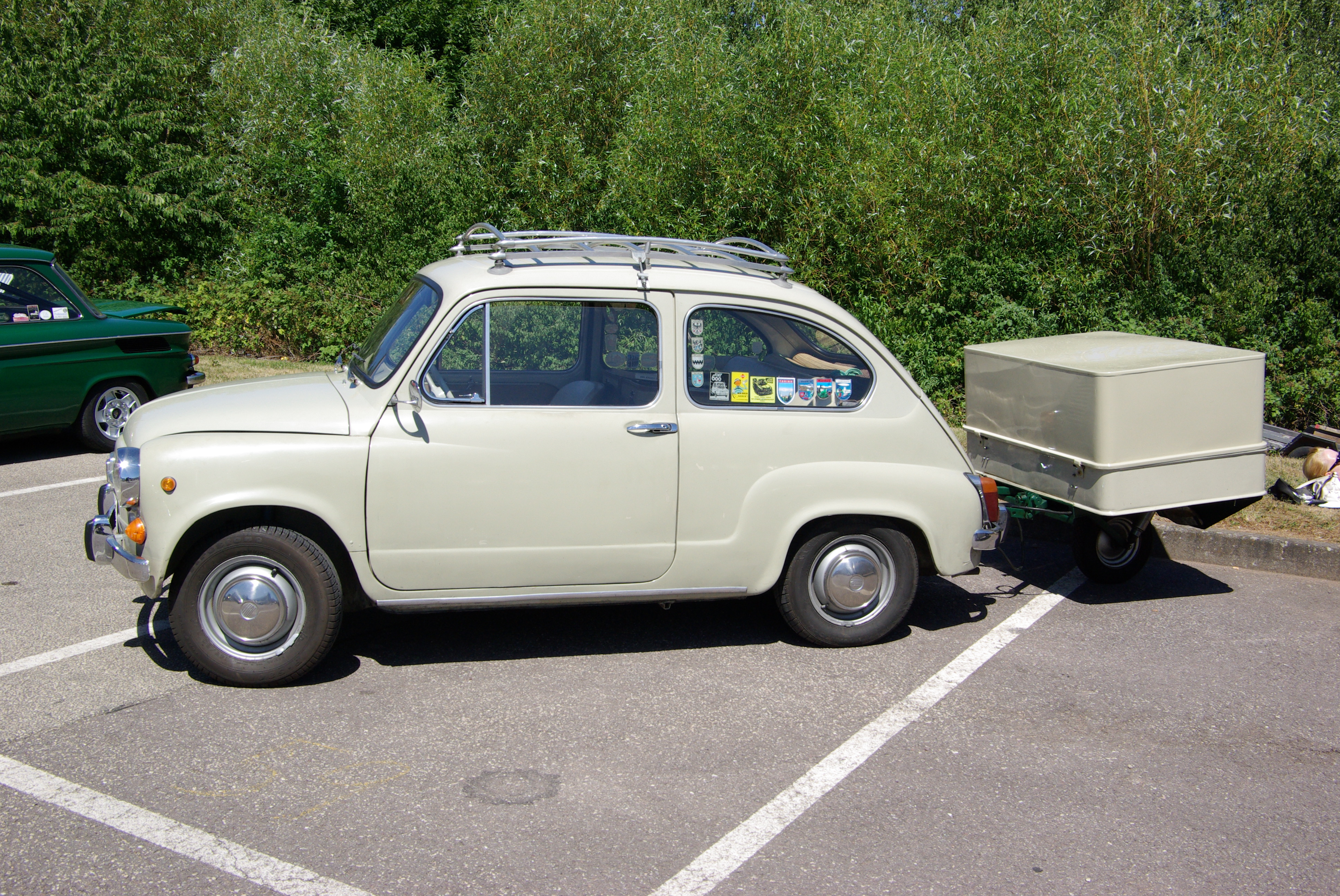 Fiat 600, Baujahr 1966, 23 PS mit Einradanhängeraufgenommen bei / photographed at "Internationales Konzer Oldtimer-Treffen", 18. Juli 2010